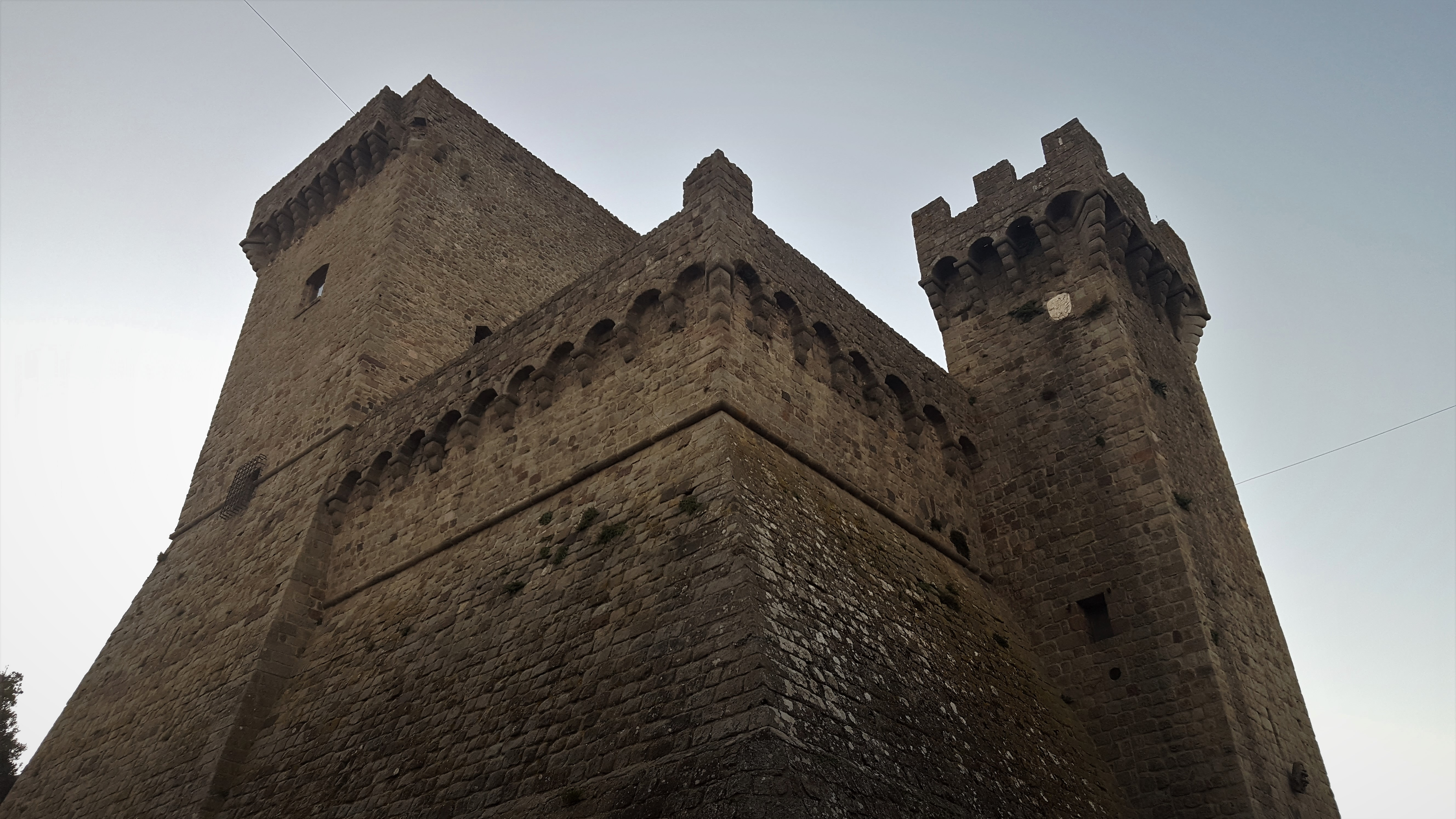 Lato interno alle mura della rocca aldobrandesca di Piancastagnaio